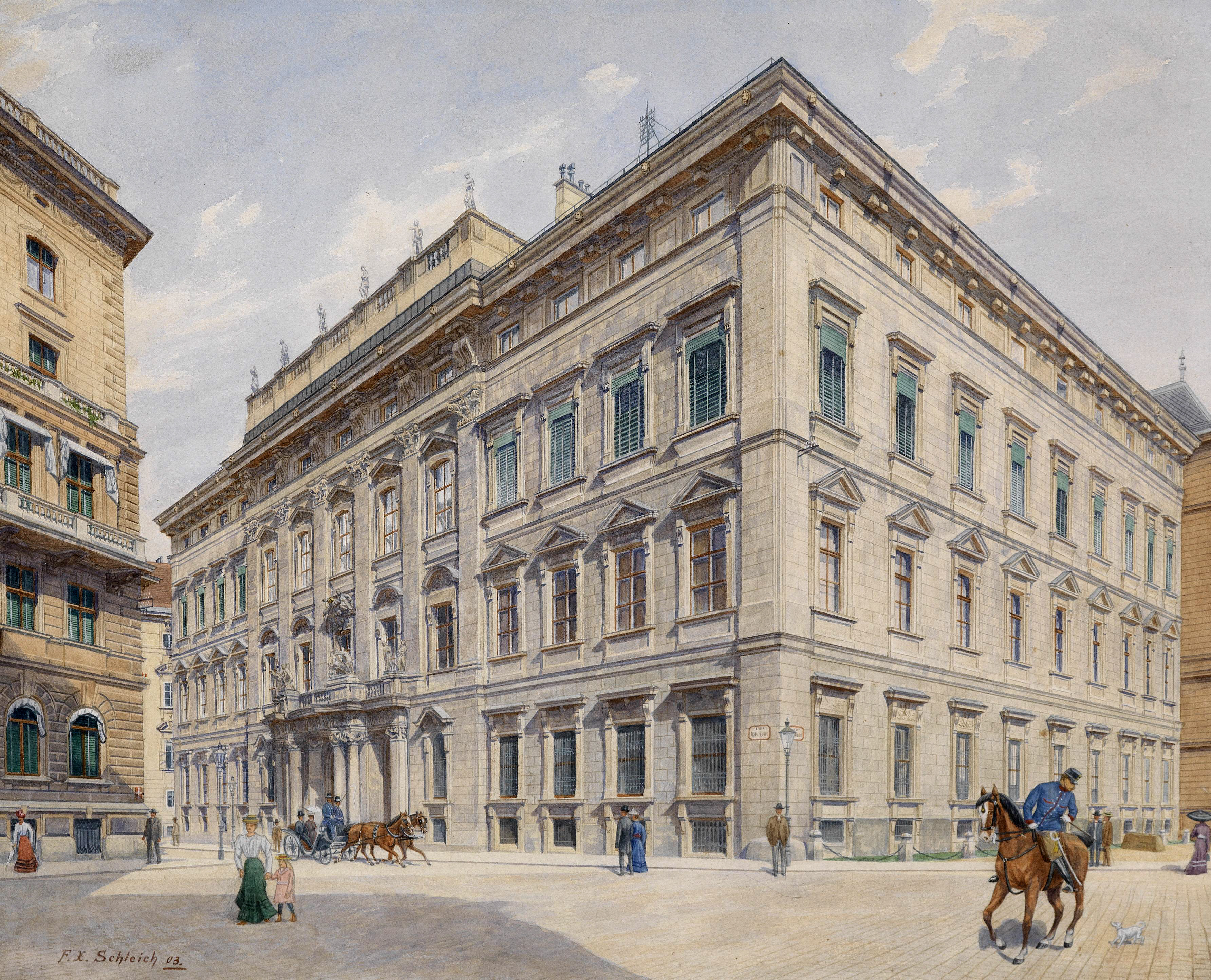 Das Stadtpalais Liechtenstein in der Bankgasse, signiert und datiert F. x. Schleich (19)03, Aquarell auf Papier, 38 x 48 cm